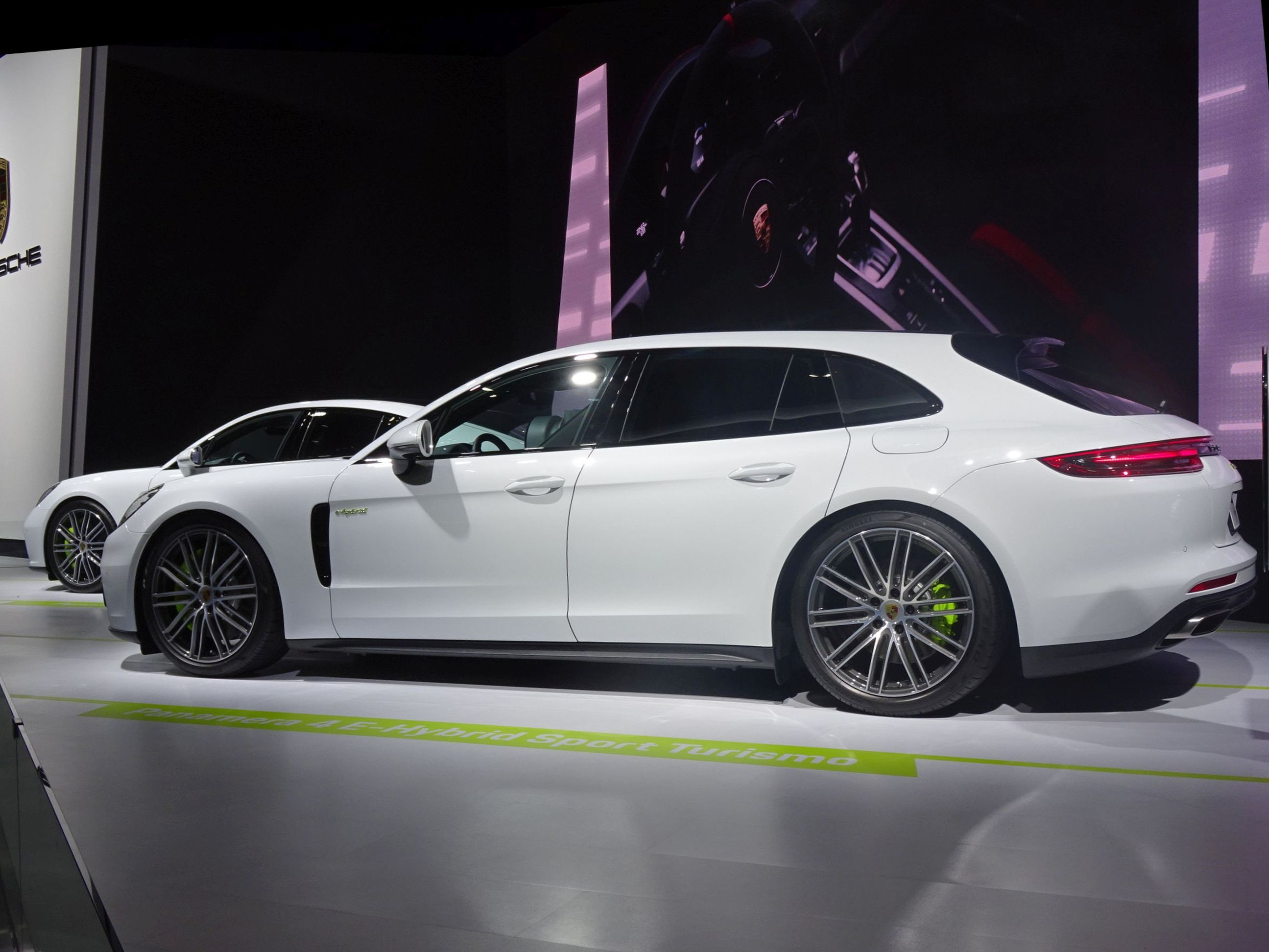 パナメーラスポーツツーリズモ横画像(TMS2017)